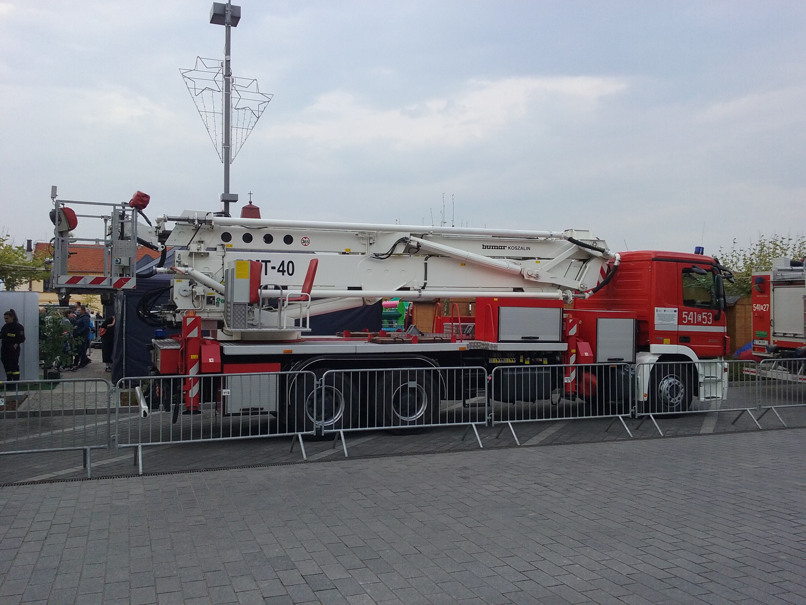 Tomaszów Mazowiecki w województwie łódzkim, PL, EU. Jeden z pojazdów z ratowniczym podnośnikiem koszowym tomaszowskiej Państwowej Straży Pożarnej, CC0